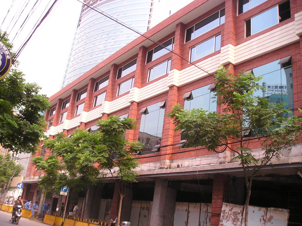 上海南阳路基督徒聚会所